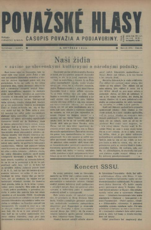 Titulný list periodika Považské hlasy, ktoré vychádzalo na Slovensku po prvej svetovej vojne.